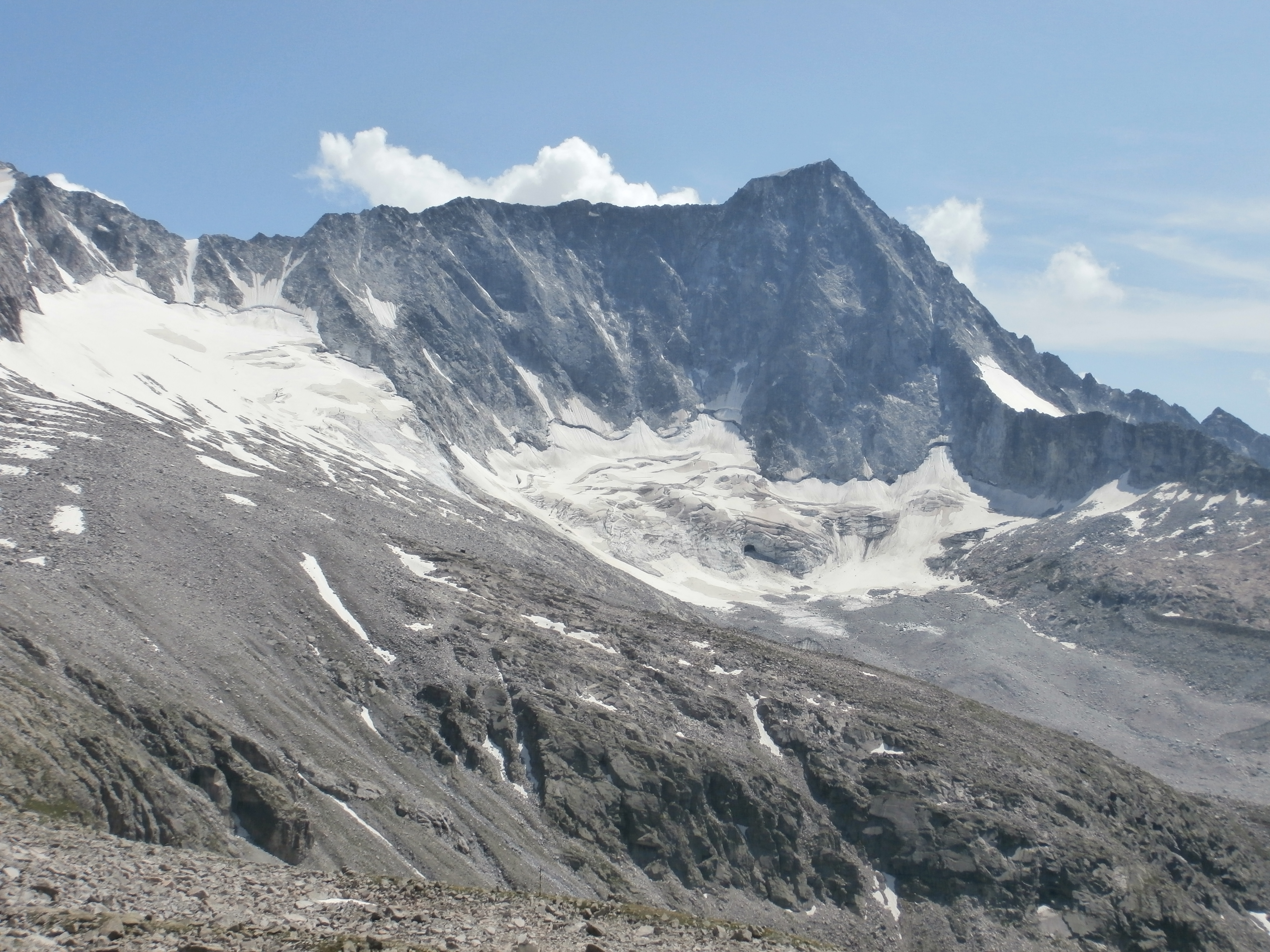 Ghiacciaio del Venerocolo nel 2015